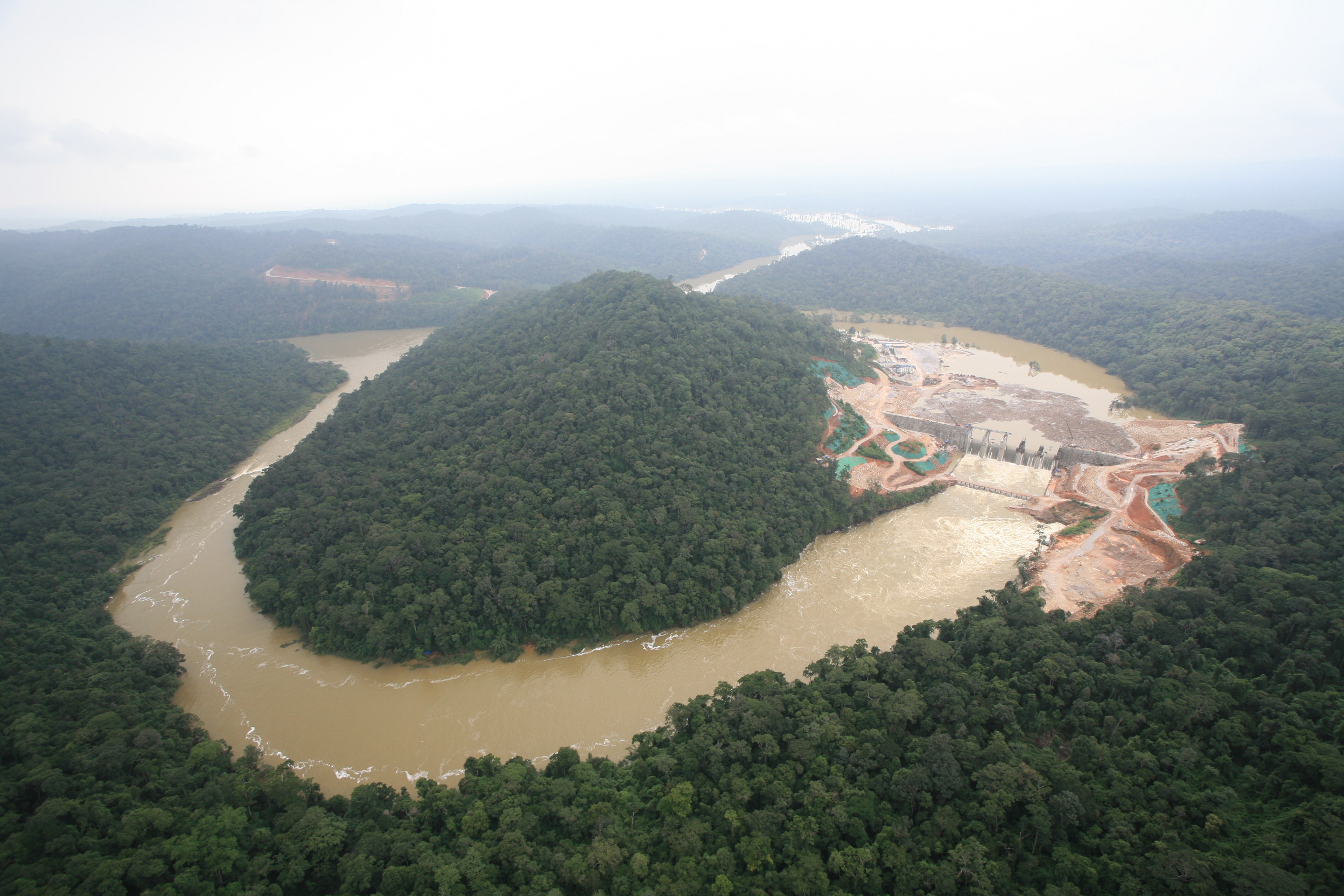 NUMTHEUN2